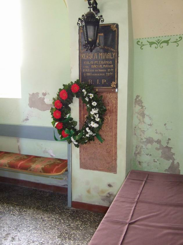 Szakácsy Sándor pap sírja a vajdasági Kúlában